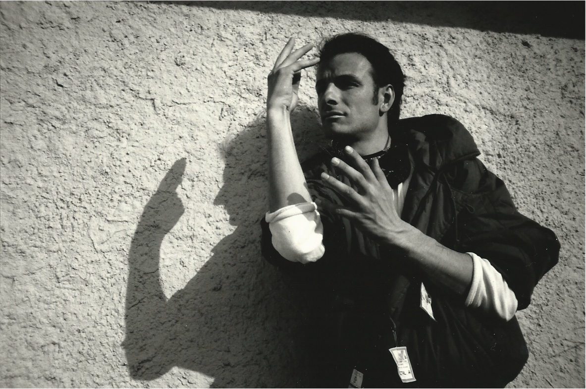 Bruno Moncelle est militant sourd.